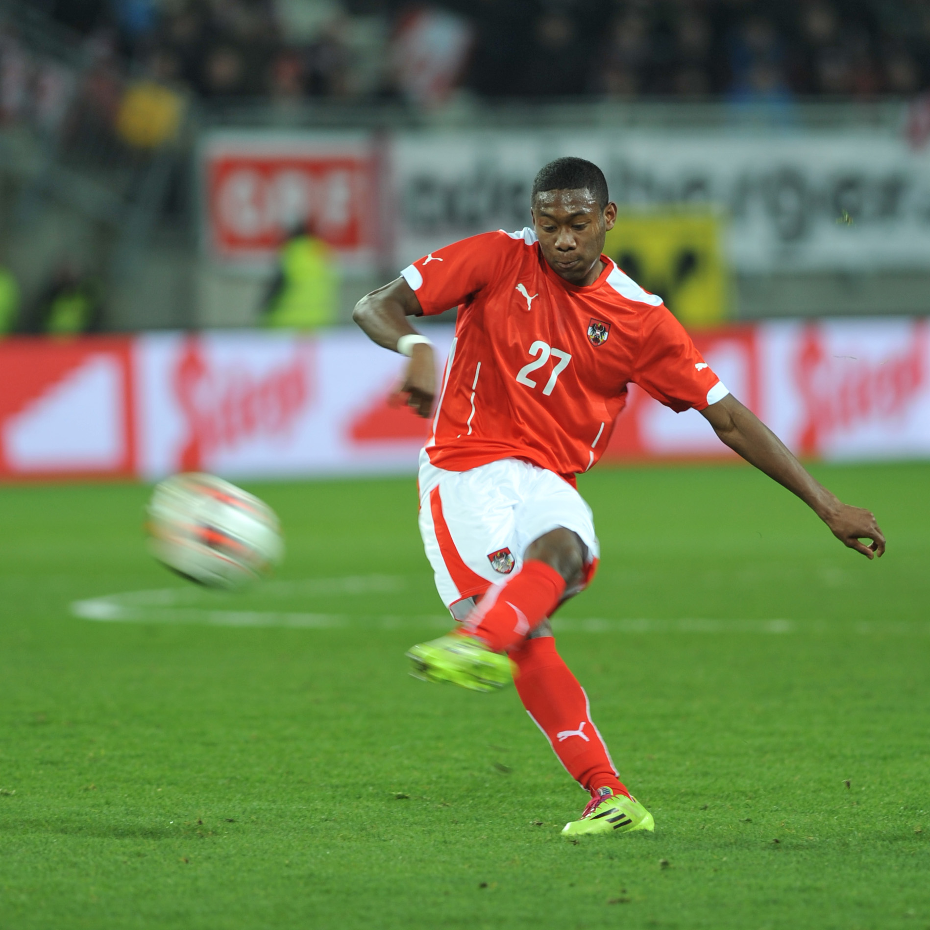 Freundschaftliches Länderspiel Österreich - Uruguay am 5. März 2014 in Klagenfurt: David Alaba